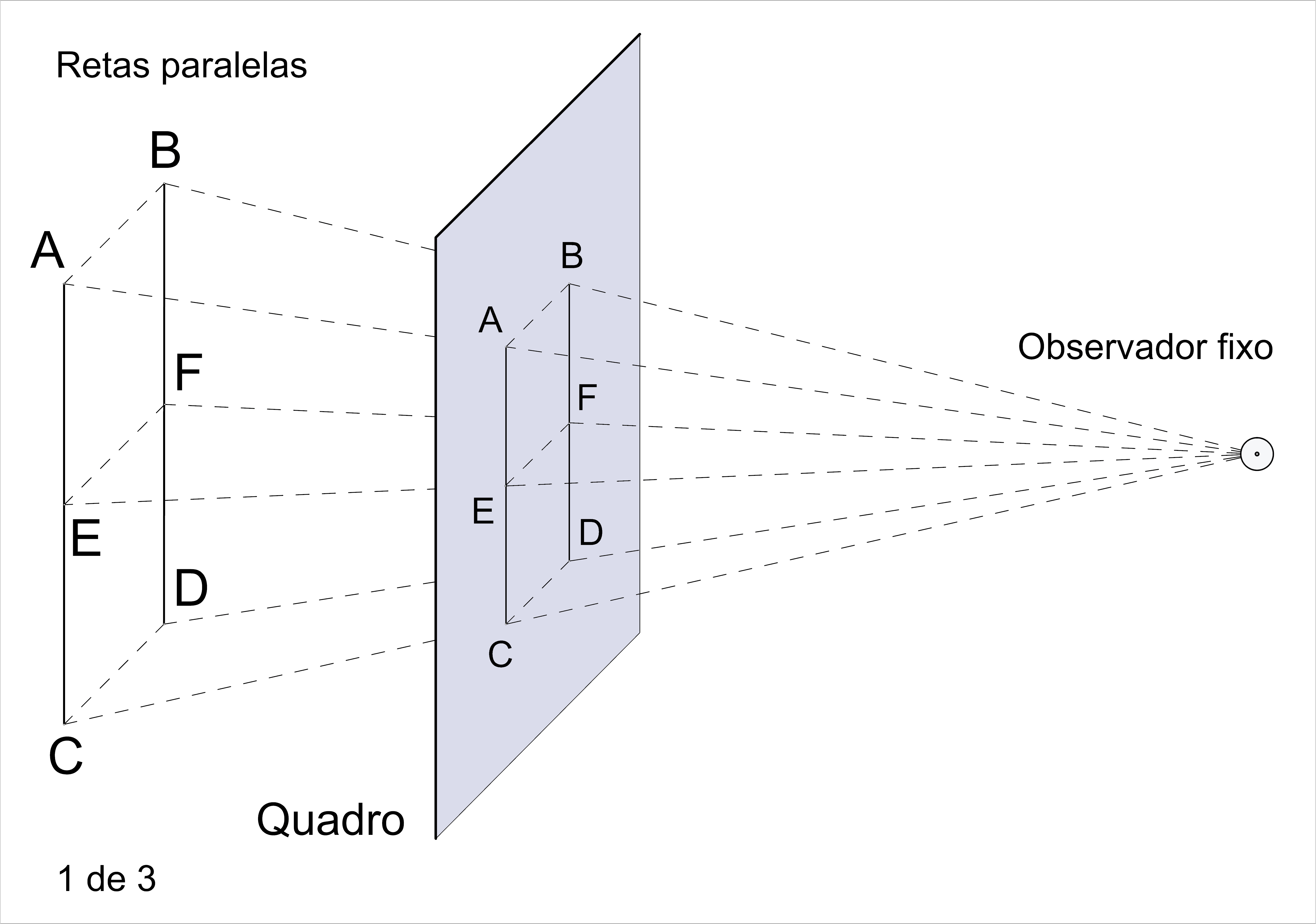 Sistema cônico de projeção central